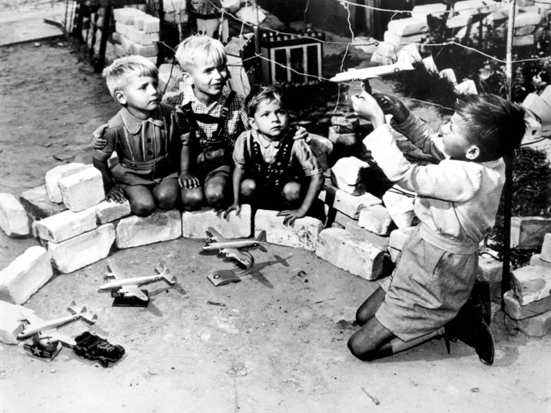 一群正在玩著「柏林空運」遊戲的柏林孩童 維生作戰（Operation Vittles）是美國軍方給予著名的zh:柏林空運（Berlin Airlift）正式的任務名稱。zh:1948年6月間，蘇聯所主導的zh:東德政權以技術上的藉口封鎖了從zh:西德通往zh:西柏林的高速公路（Autobahn）與zh:鐵路之後，美國軍方在zh:6月26日正式啟動此任務，使用大量的zh:C-47“空中列車”（Skytrain）式與zh:C-54“空中霸主”（Skymaster）式運輸機，跨越東德領空運送包括糧食在內的補給物資到西柏林。這條由運輸機所串成空中補給動脈俗稱“空橋”（Luftbrücke），柏林空運任務一直到zh:1949年zh:7月31日才正式宣告結束。 圖中所見是一群住在柏林坦伯霍夫空軍基地（Tempelhof AB）旁的德國小孩，拿著當時在西柏林玩具店裡都可買到的美國運輸機模型，模仿柏林空運時飛機降落的遊戲。坦伯霍夫是當時西柏林境內唯一的機場，今日該機場則是作為柏林的市區機場，與做為國際機場的zh:提格機場（Tegel）搭配使用。 本照片下載自美國空軍官方新聞網站，由美國政府開放照片版權至公共領域。